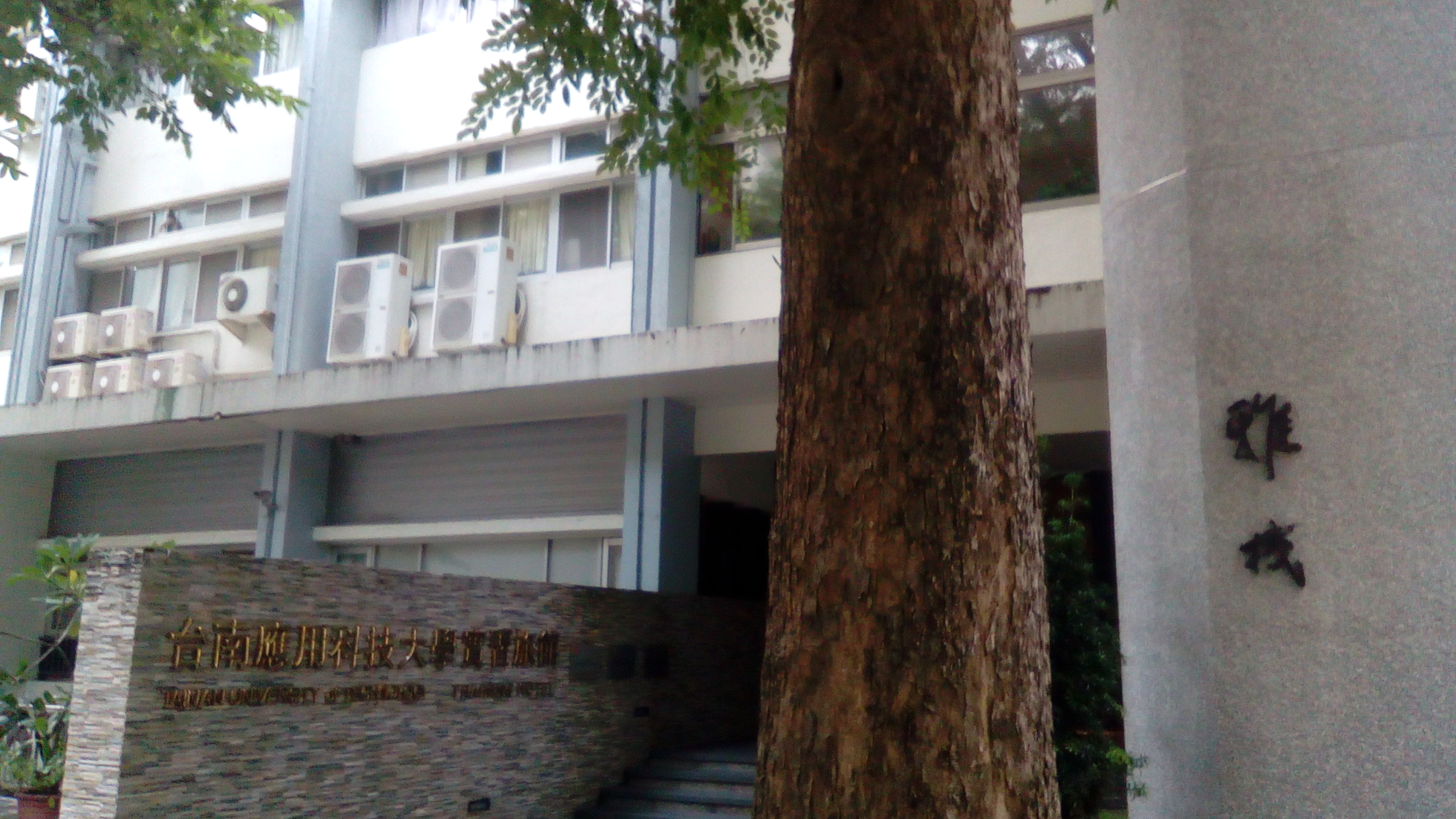 旅管系實習時專用